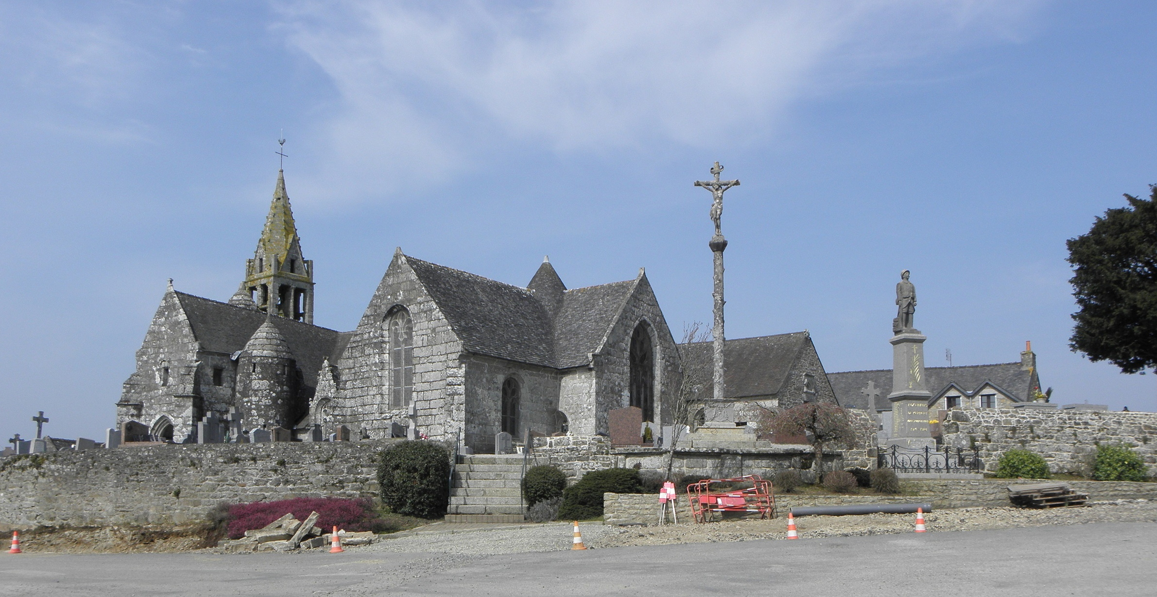 Chevet et flanc sud de l'église Saint-Pierre de Kerpert (22).